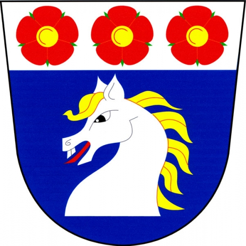 znak, Útěchov, okres Svitavy